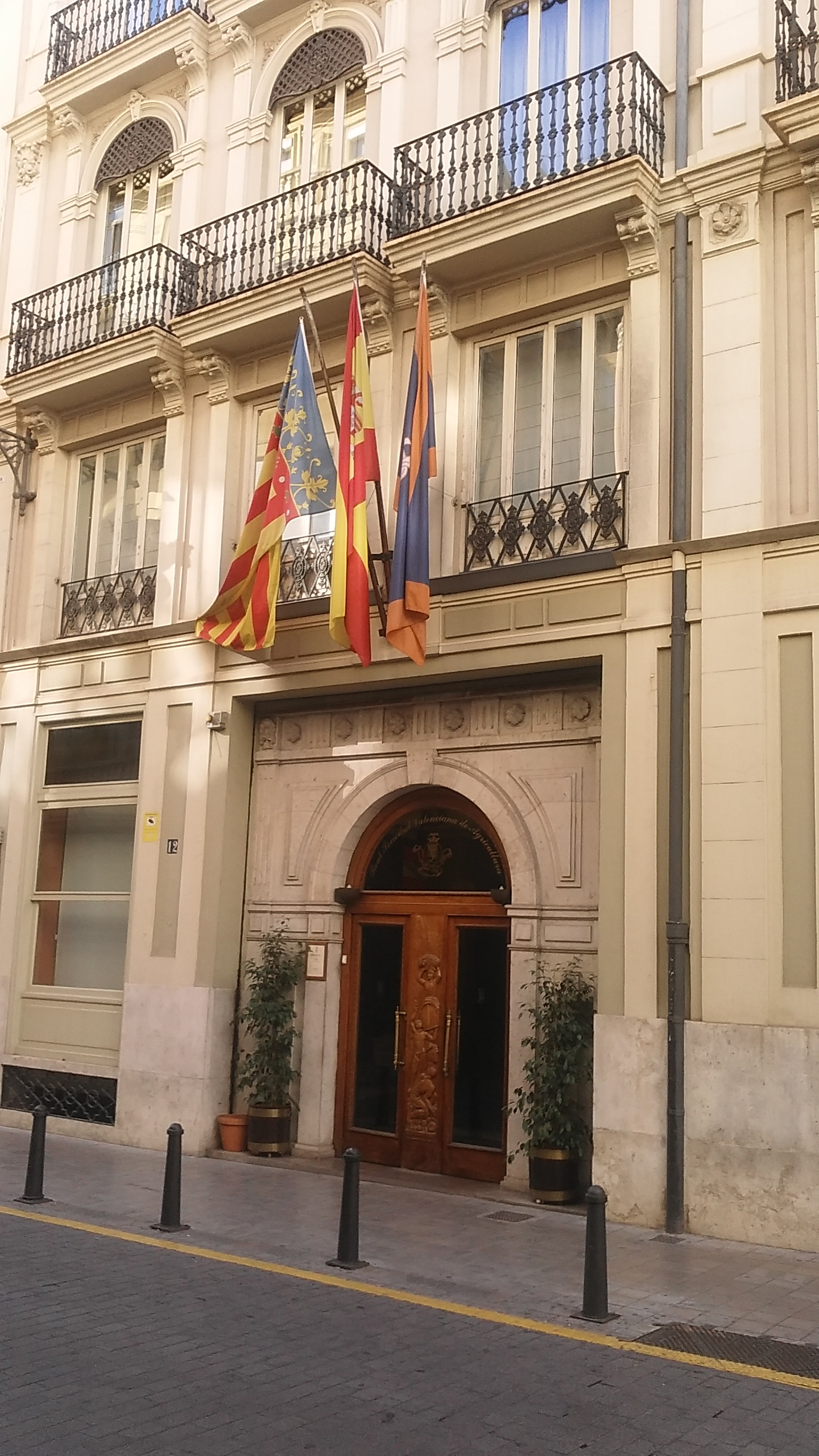 Seu de la Real Societat Valenciana d'Agricultura i Deports (RSVAD) en el carrer Comedies número 12 cantó en el carrer de la Pau número 30, en Valéncia. Obra del mestres d'obres Lucas García Cardona en 1899-1902.